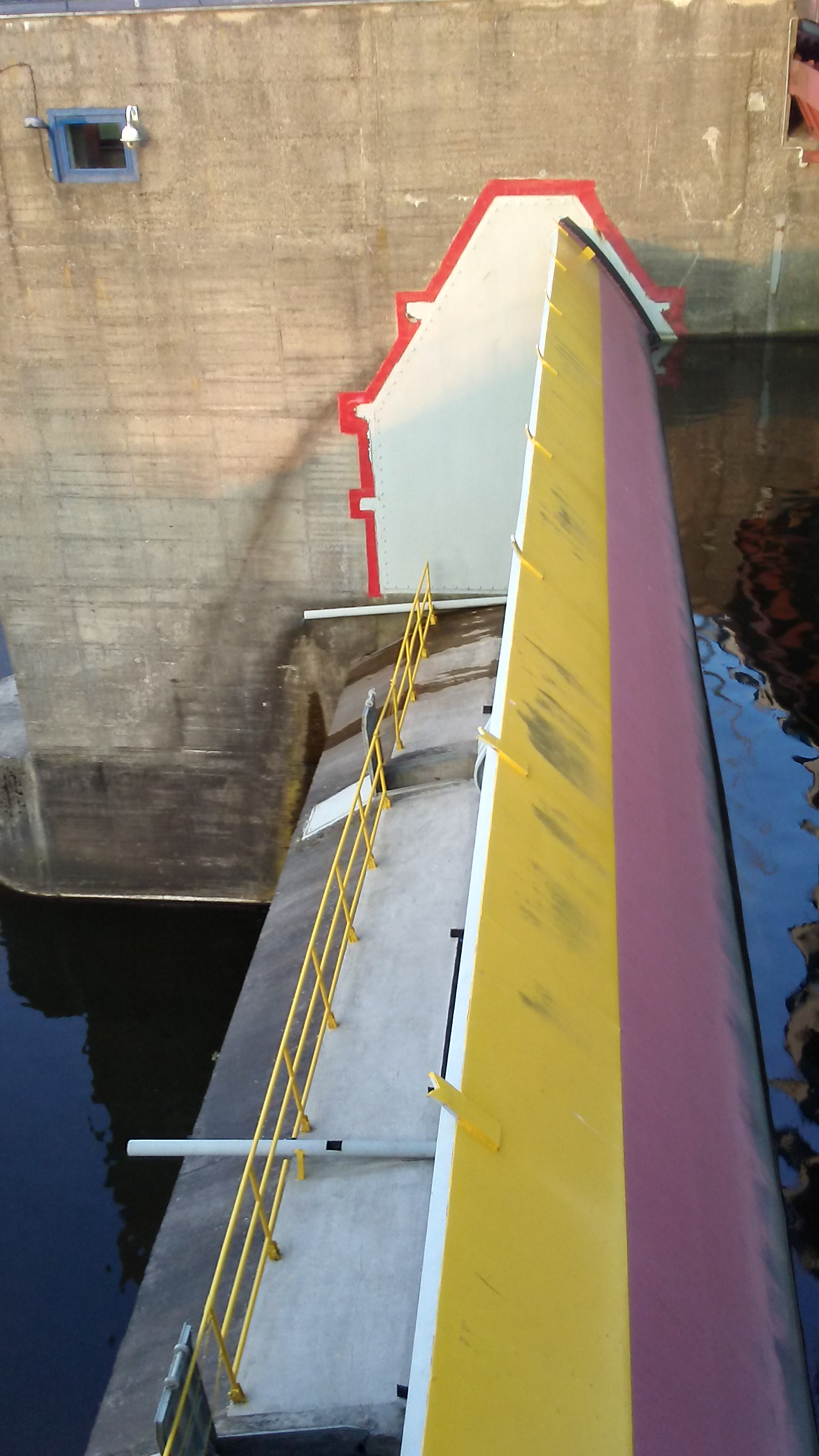 Jedna ze śluz zapory wodnej na Zalewie Sulejowskim 7 km od Tomaszowa Mazowieckiego